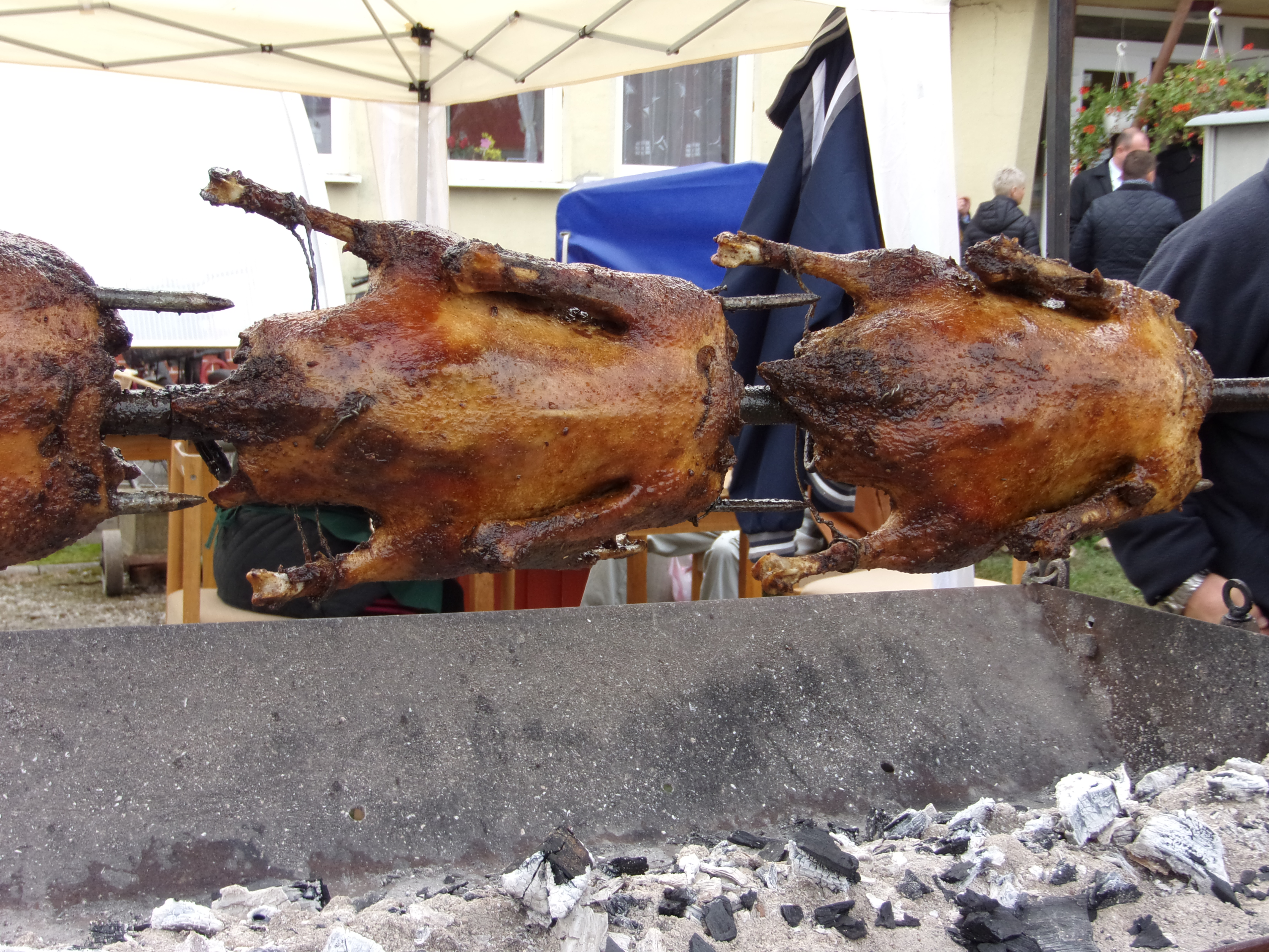 A nyagtárkányi Libagaliba egyik látványossága : sült libák